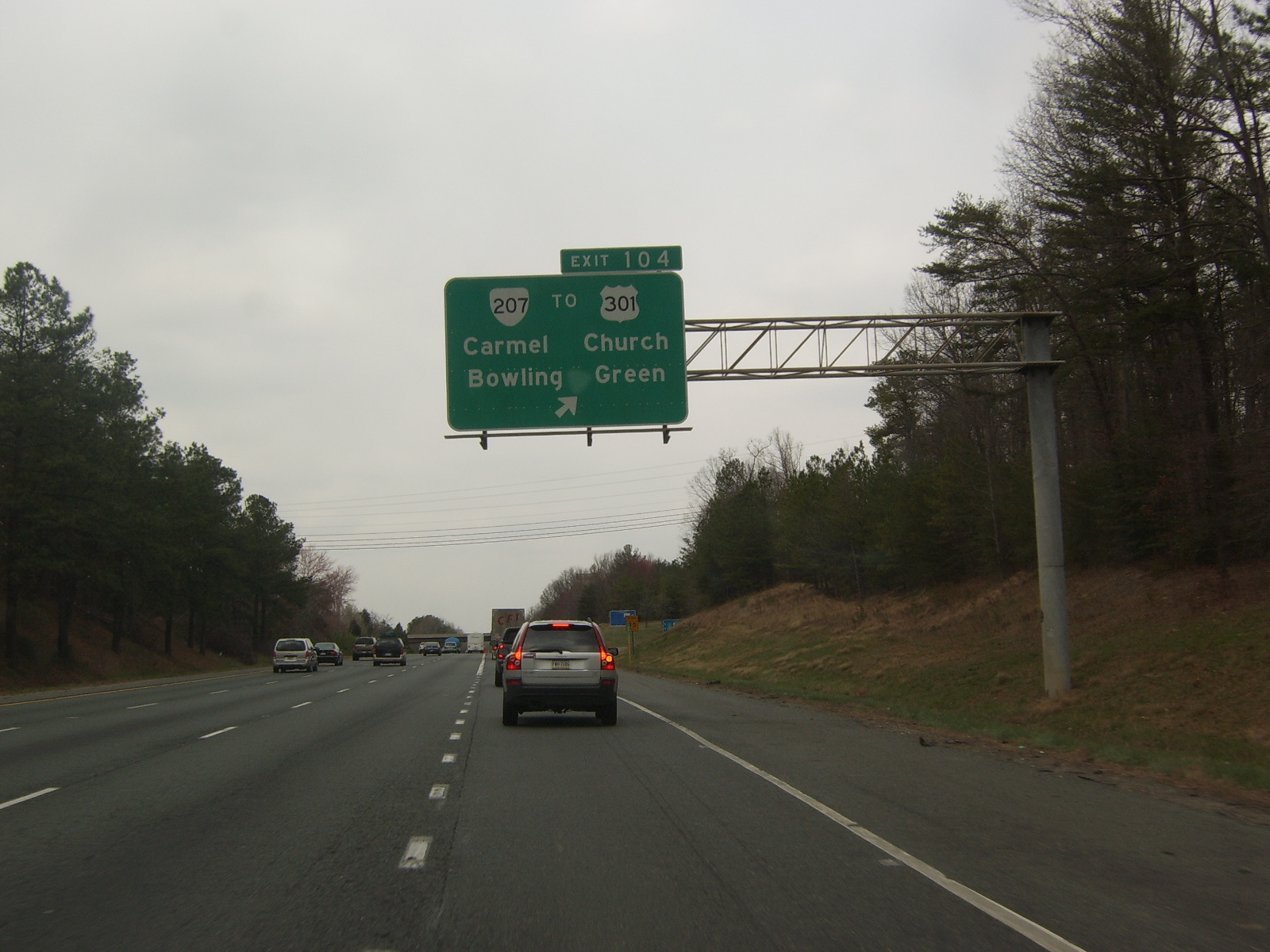 STA60428